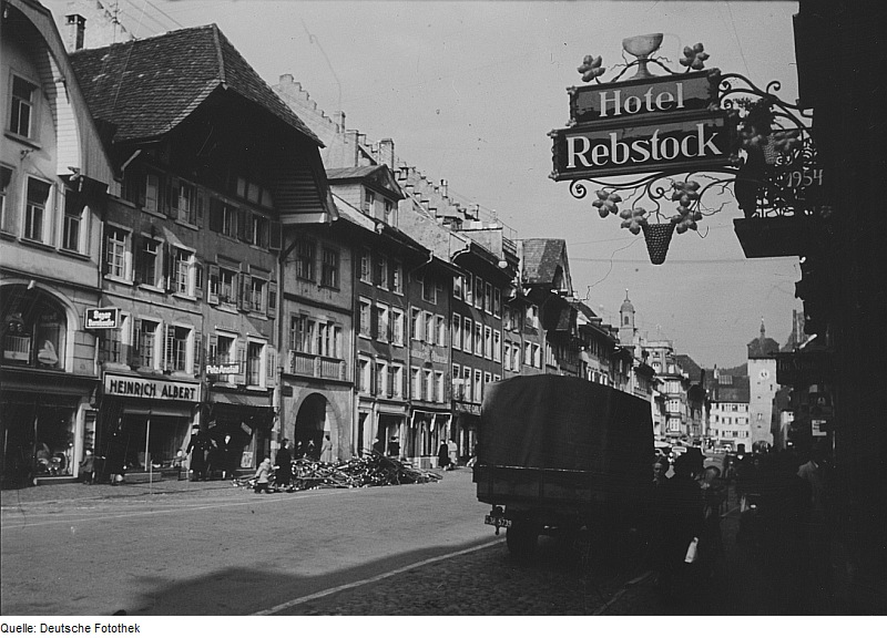 Original image description from the Deutsche Fotothek Eltville. Straßenansicht mit Hotel "Rebstock"Waldshut, Kaiserstrasse mit Oberem Tor [1]